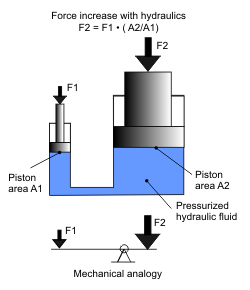 Hydraulic force ratio principle